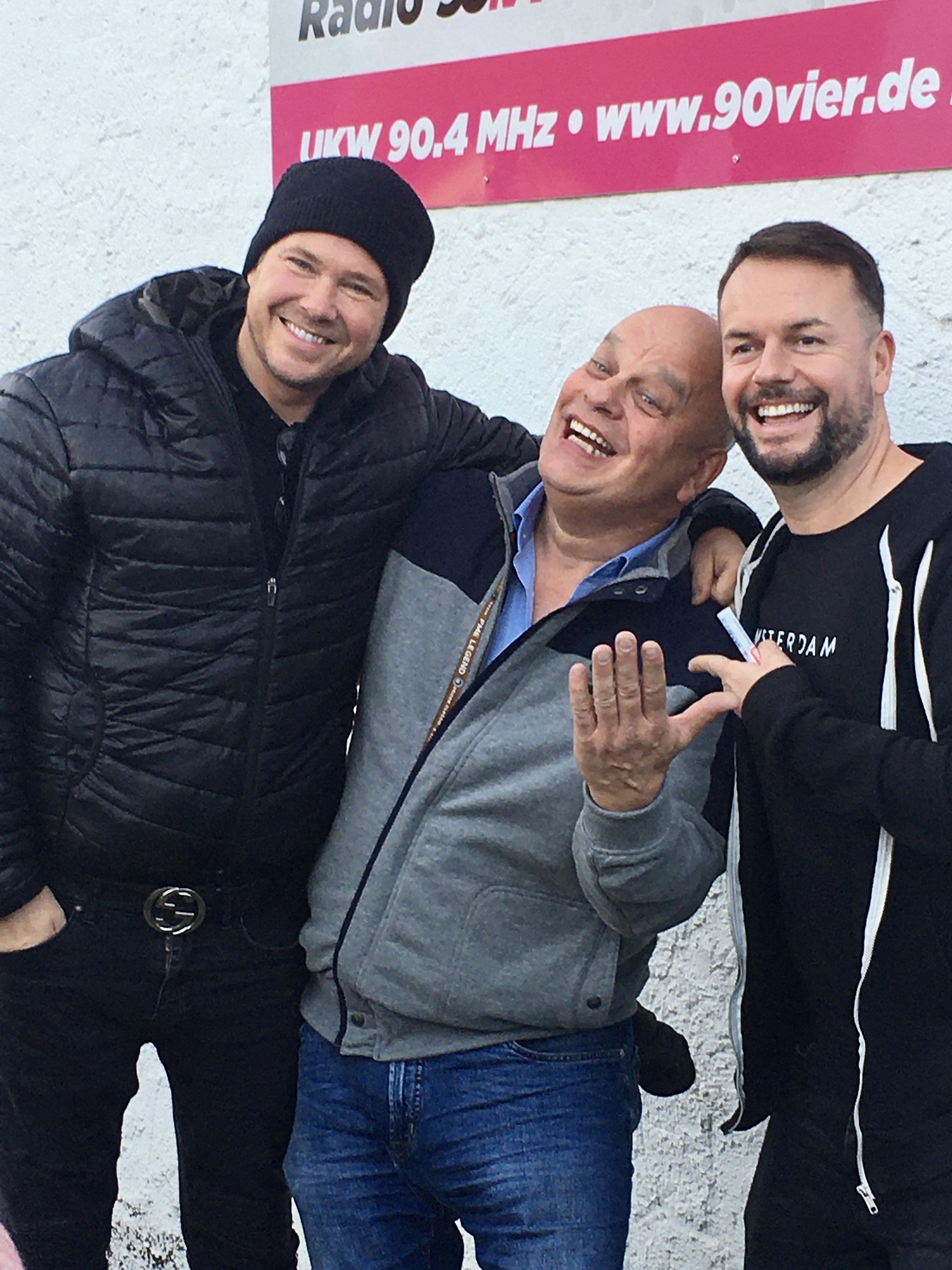 Moderator Martin Scholz, Geschäfsführer Jürgen R. Grobbin von Radio 90.vier und Studiogast Lee Baxter